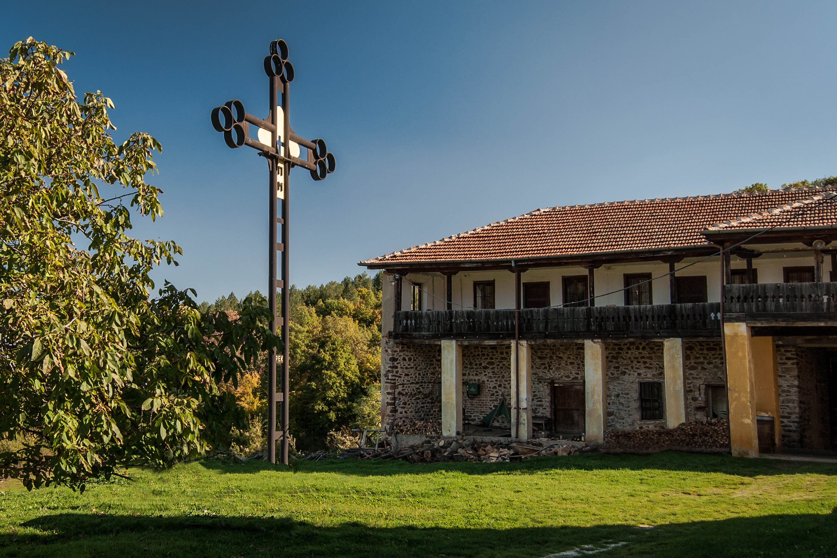 Двор на црквата „Св. Ѓорѓи“, главна манастирска црква на Велушки манастир